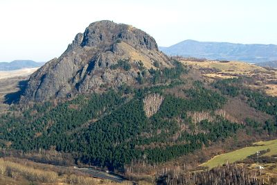 Bořeň ze Želenického vrchu.